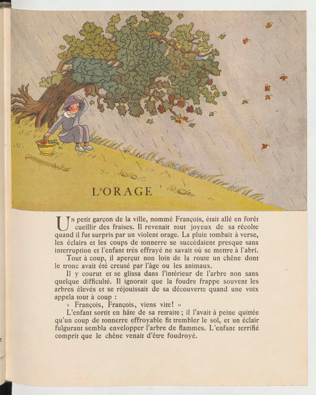 Contes et images, illustrations Marie-Madeleine Franc-Nohain : L'orage, Christoph von Schmid.